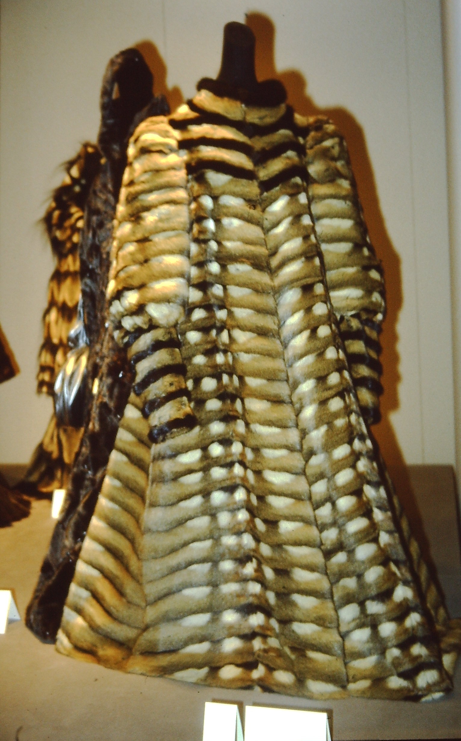 Leistungswettbewerb des Kürschnerhandwerks, Leistungsschau 1982, anlässlich der Pelzmesse in Frankfurt am Main. Hamstermantel mit Nerz.